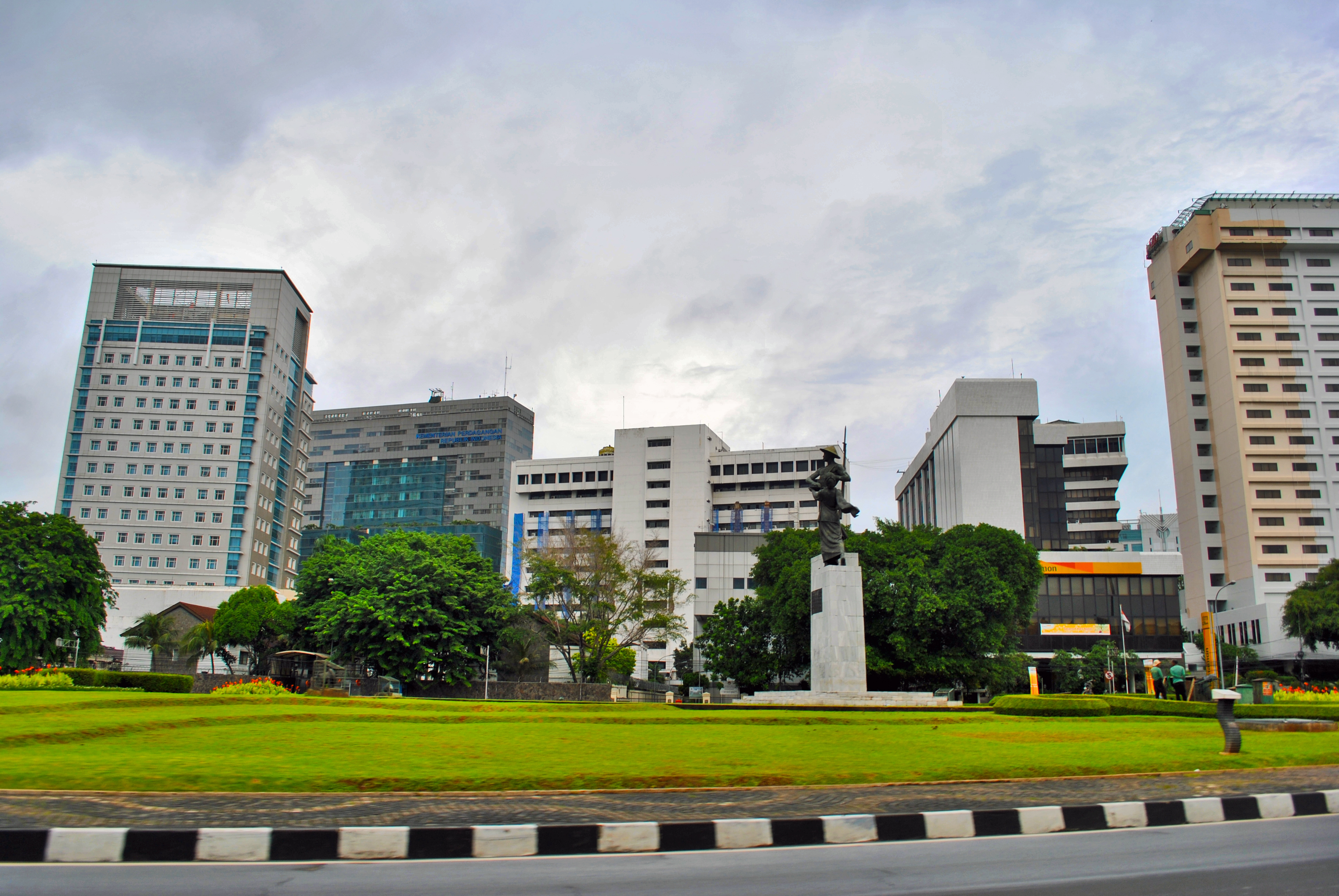 Patung Pak Tani